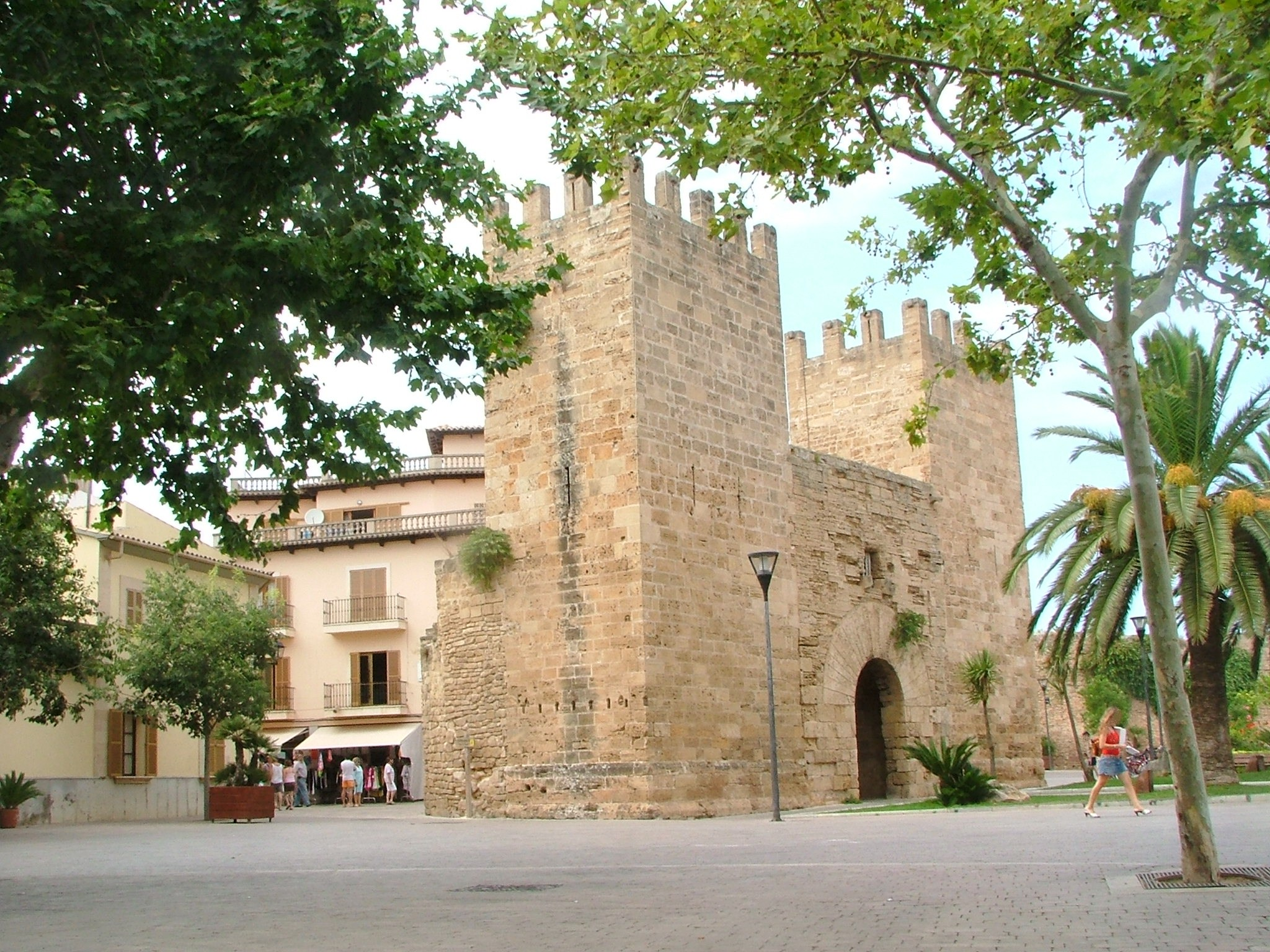 Gate or Porta del Moll of Alcudia, Mallorca, Spain